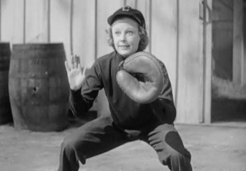 1949年製作の映画『甦る熱球』の予告編動画より。